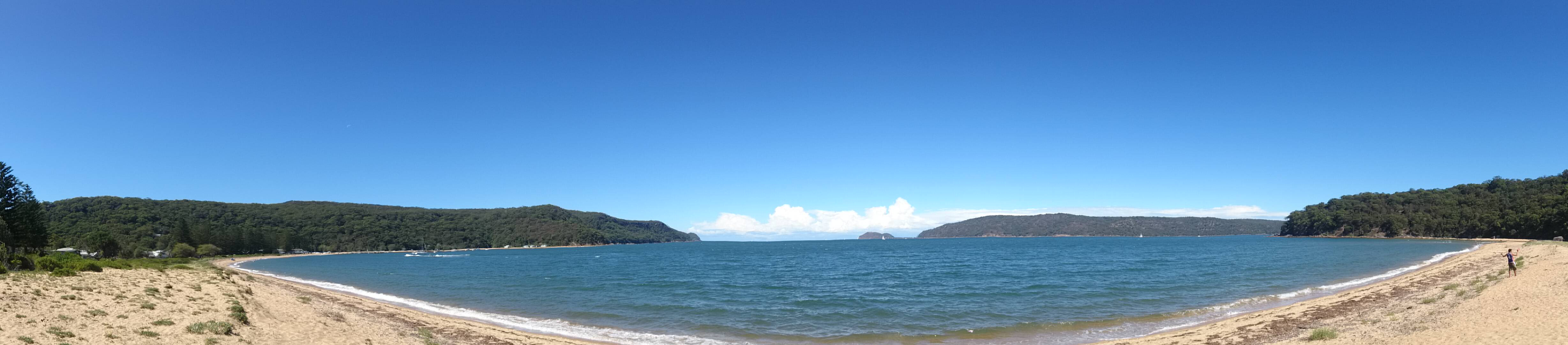 Patonga